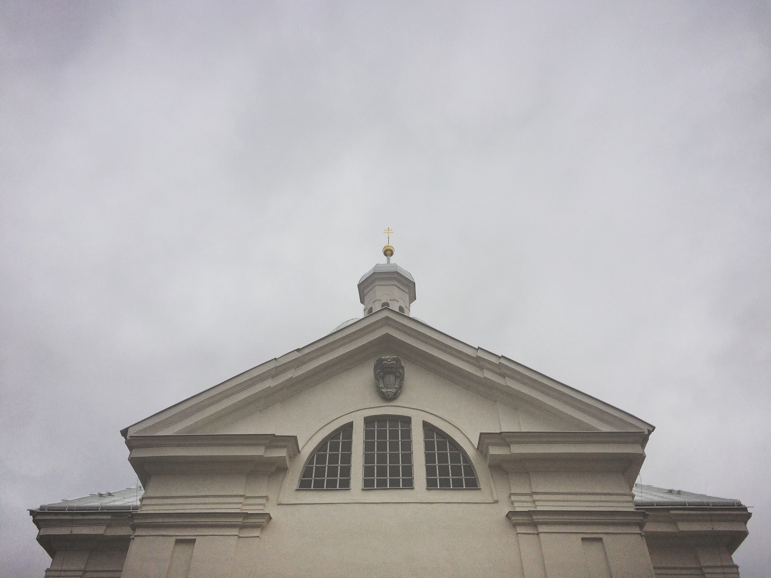 Italizující tympanon s termovým oknem a erbem Dietrichštejnů.